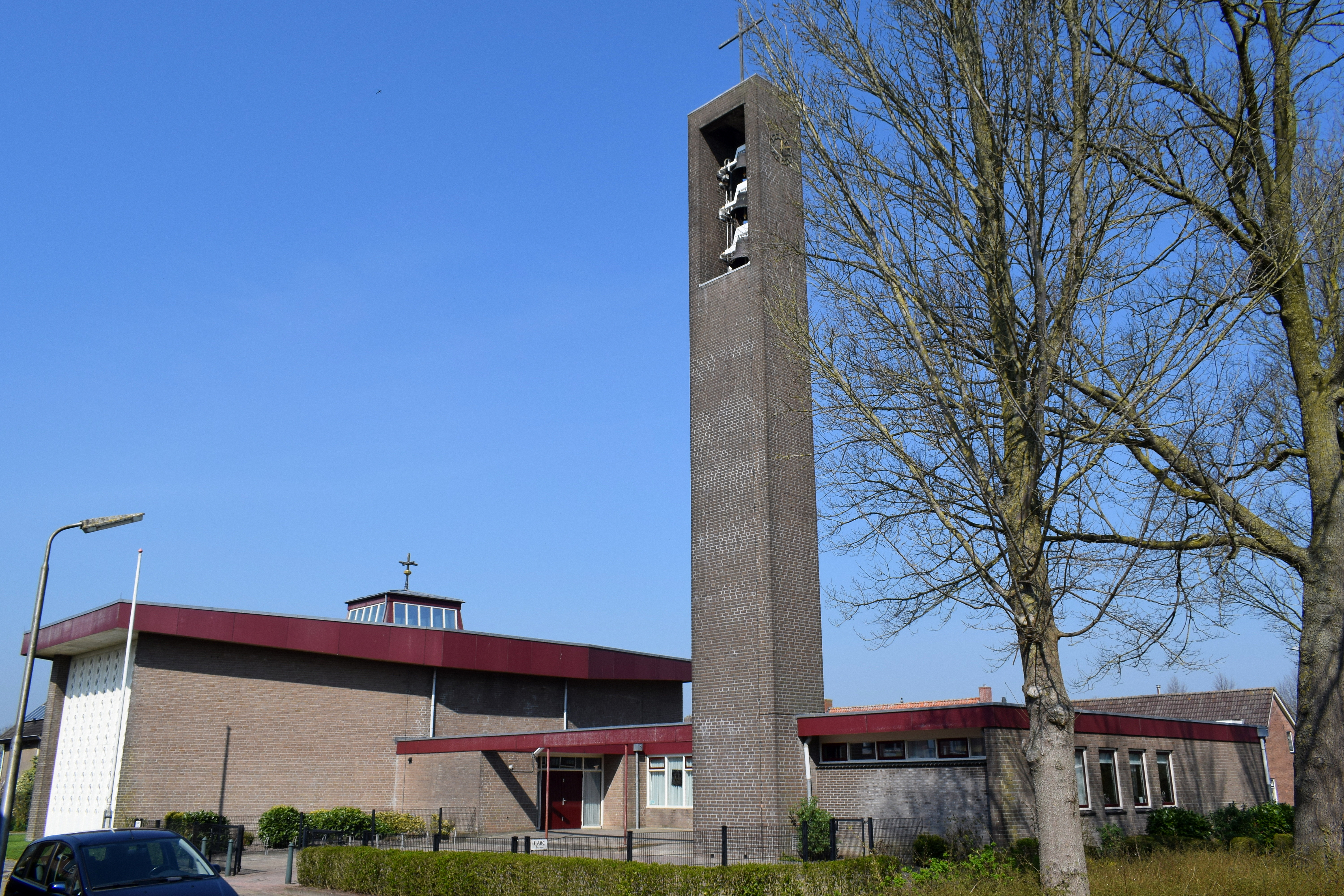 Marije-Himelfearttsjerke, Wytgaard